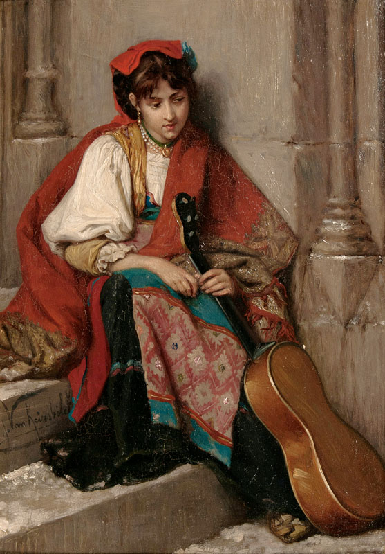 Mädchen mit Gitarre, Öl/Holz, 32 x 23 cm, l. u. sign. J. von Keirsbilck